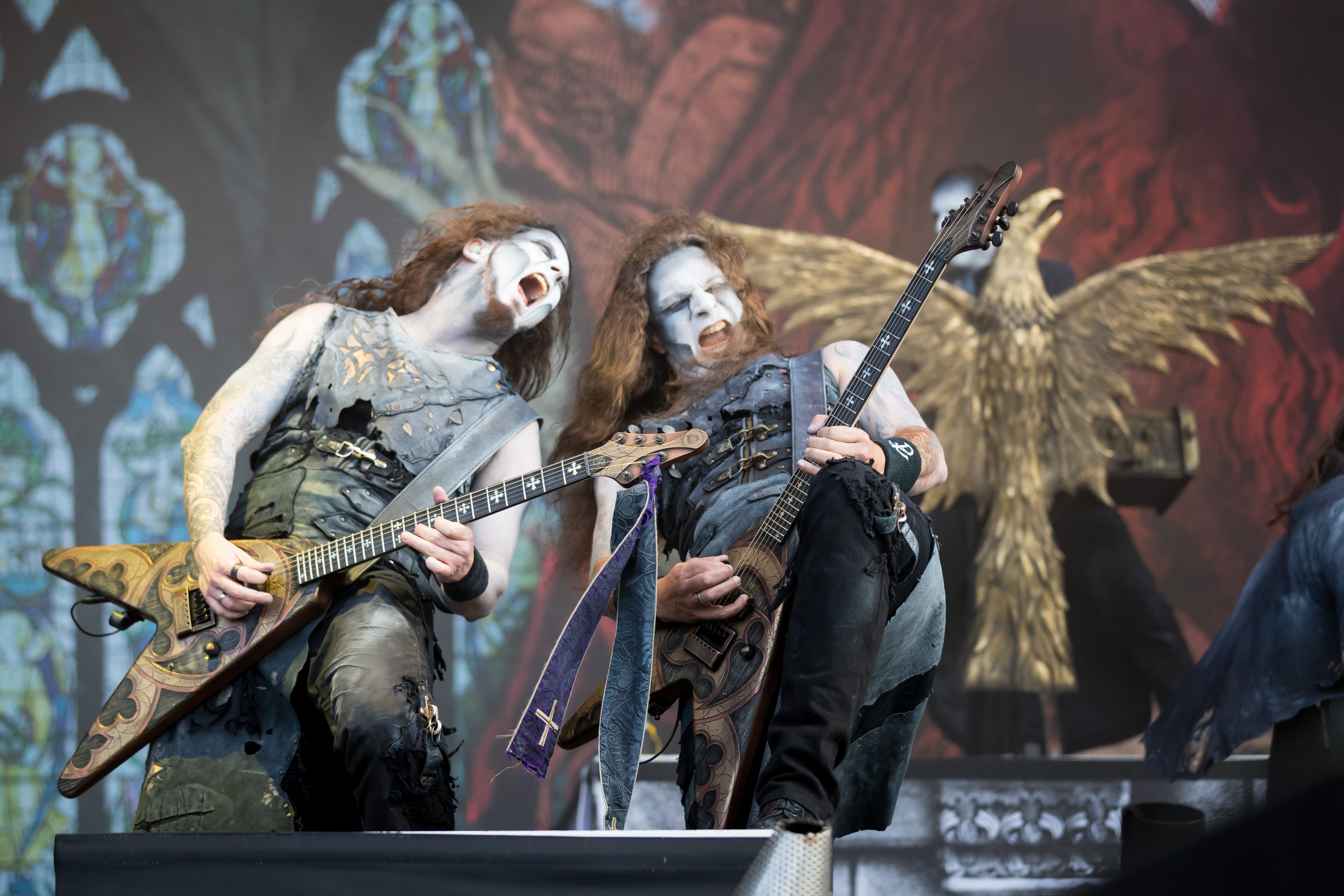 Powerwolf during Wacken Open Air at Schleswig-Holstein, Wacken, , Germany on 2017-08-05, Photo: Sven Mandel